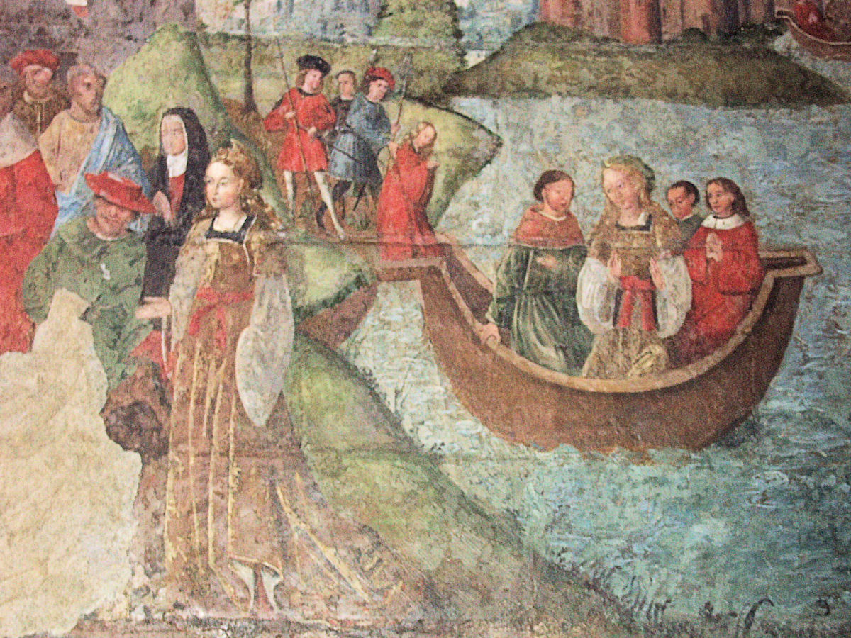 Basilique Saint-Quentin, France